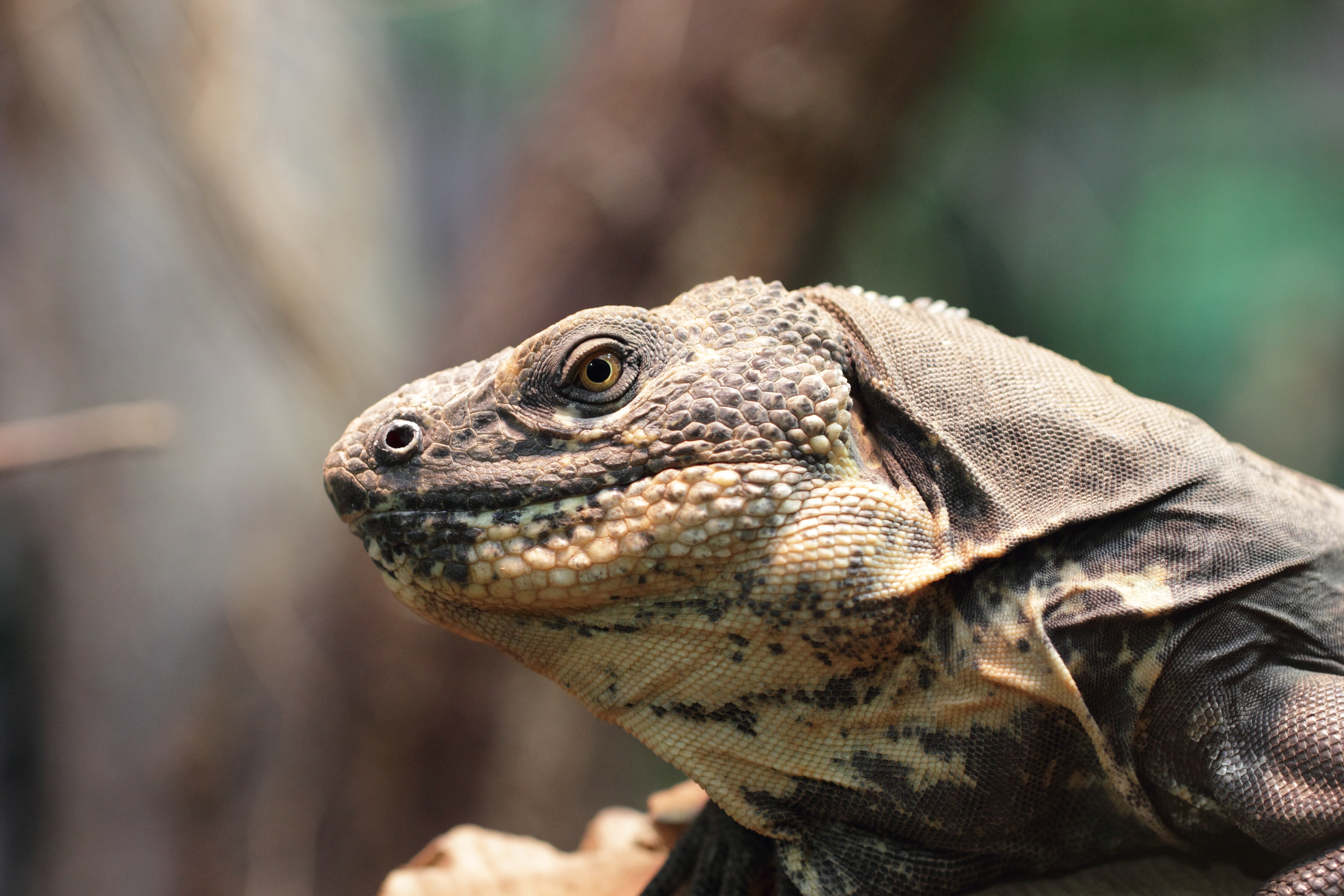 Ein Schwarzbrust-Schwarzleguan im Tiergarten Schönbrunn.